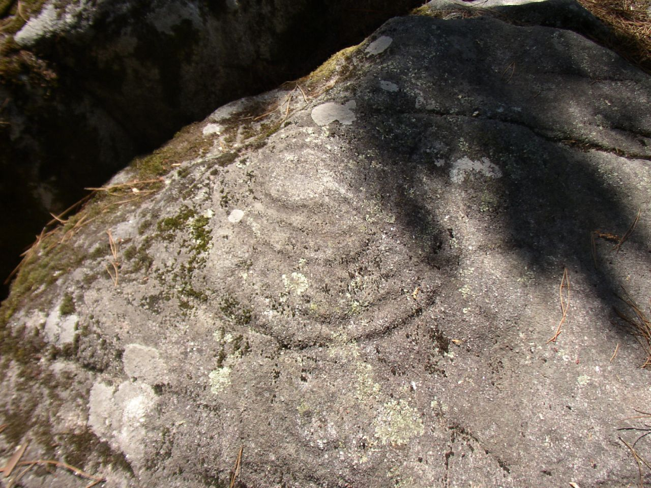 Petroglifo en los montes de la parroquia de Priegue - Nigrán.